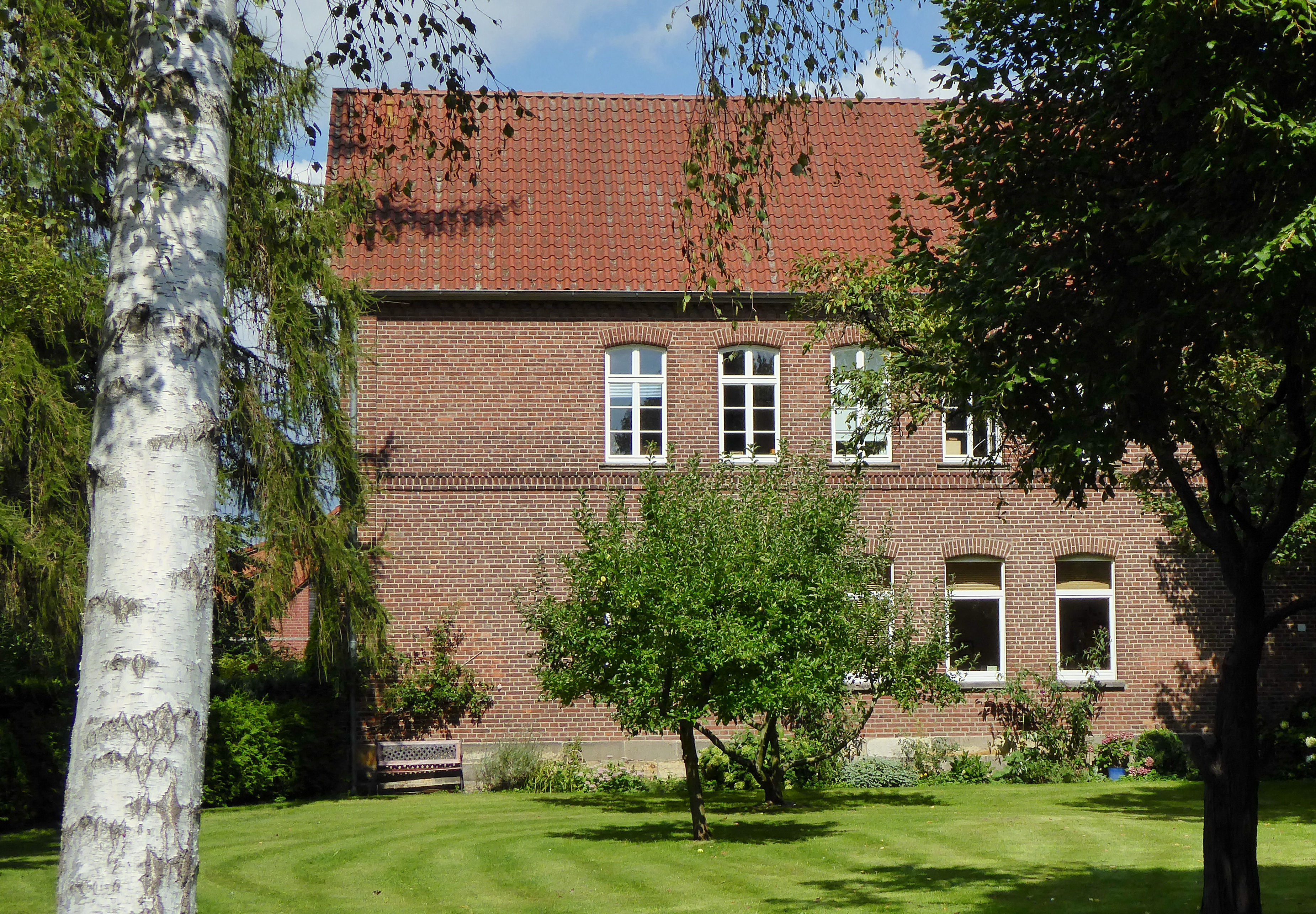 Südansicht des denkmalgeschützten Gebäudes Steller Straße 15 in Isernhagen